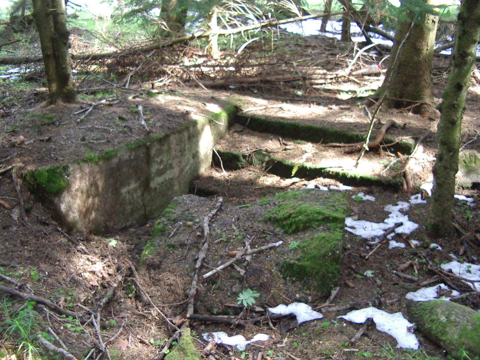 FHQ Tannenberg, Bunkerreste im Wald